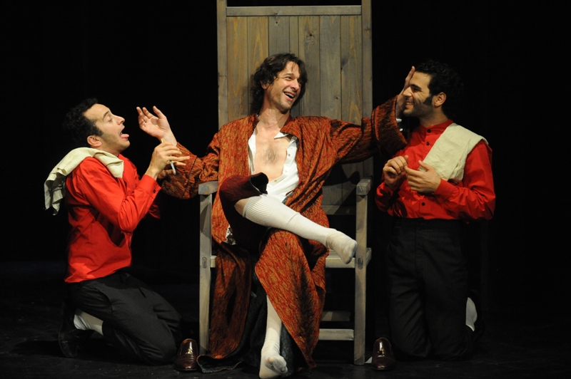 ישראל סשה דמידוב, אורי יניב וציון אשכנזי - דון ז'ואן - 2010